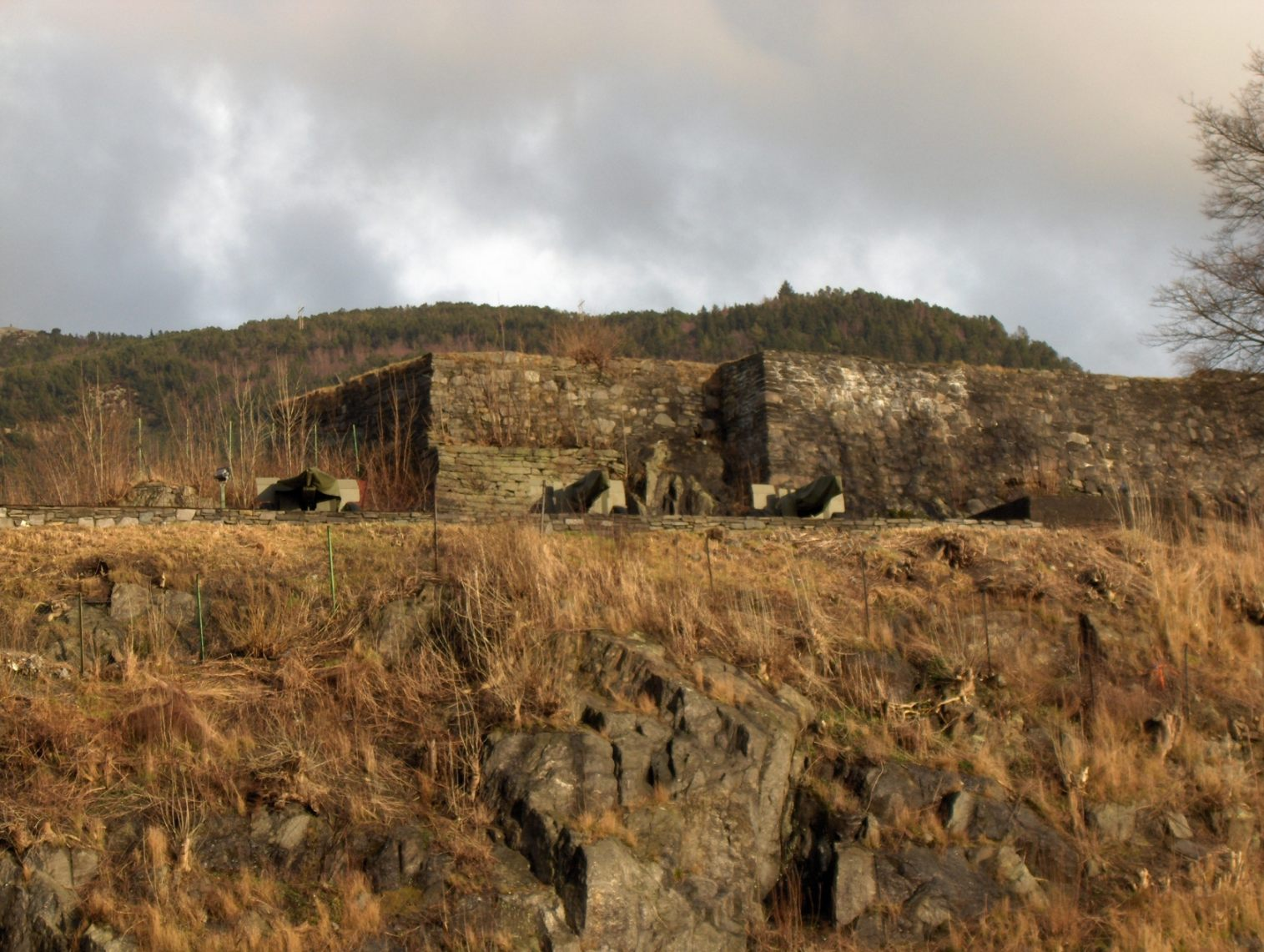 Forteresse de Sverresborg de nos jours, photo prise en février 2006. Face sud. Photo prise par moi même. Saty 3 novembre 2006 Ã 18:32 (CET)